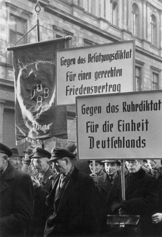 Berlin, Protestkundgebung ADN-ZB/ Illus/dpd-Bratke Berlin: Der Volksausschuss Mitte veranstaltete am 11.2.49 im Friedrichsstadt-Palast eine Protestkundgebung gegen das Ruhrdiktat, auf der der Präsident des Deutschen Volksrates, Prof. Dr. Kastner, sprach.